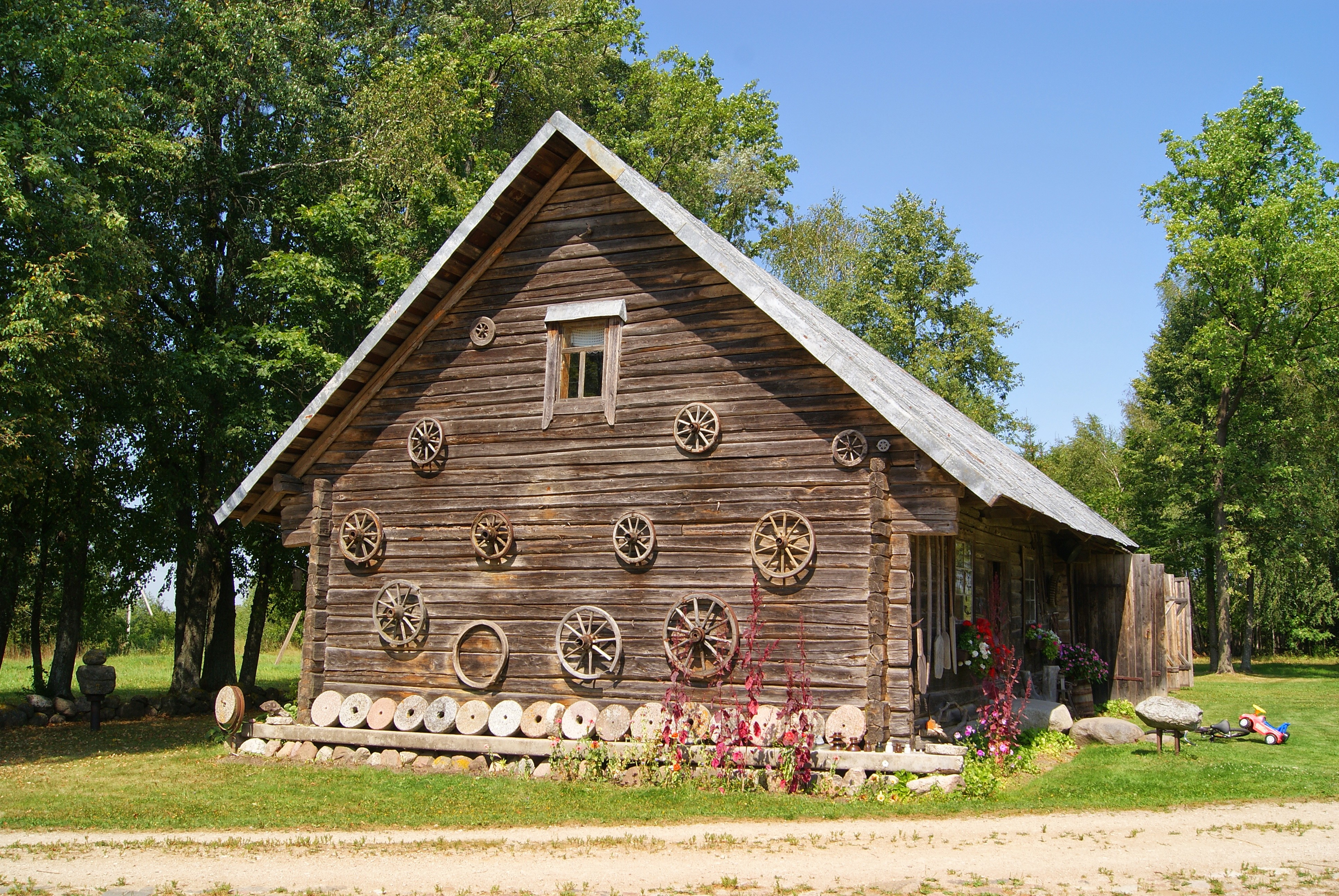 Tunaičiu sodyba- private ethnographic museum